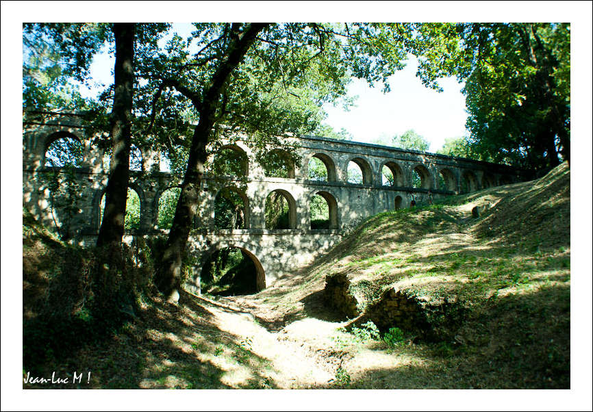 Laudun, France